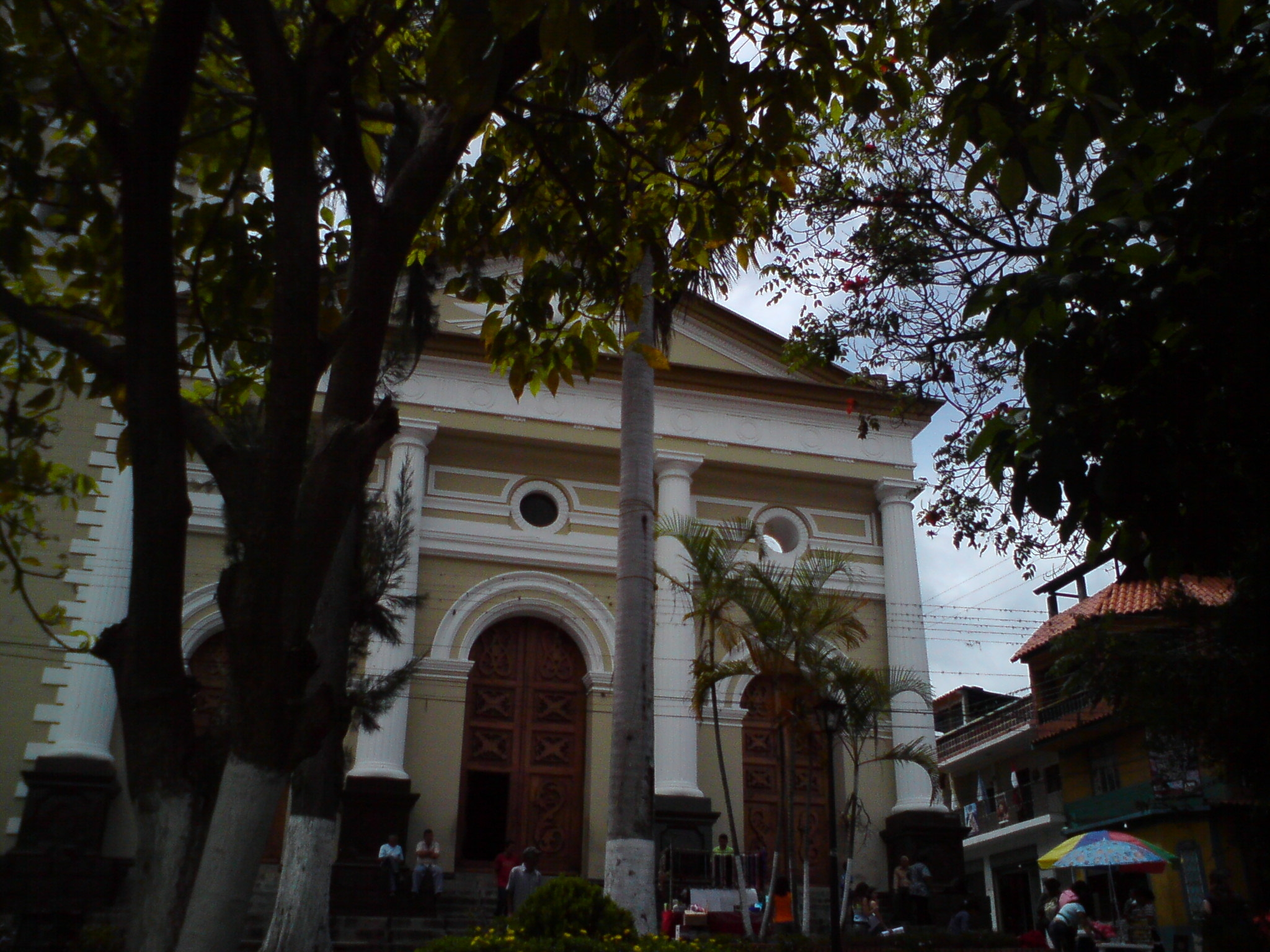 La Grita